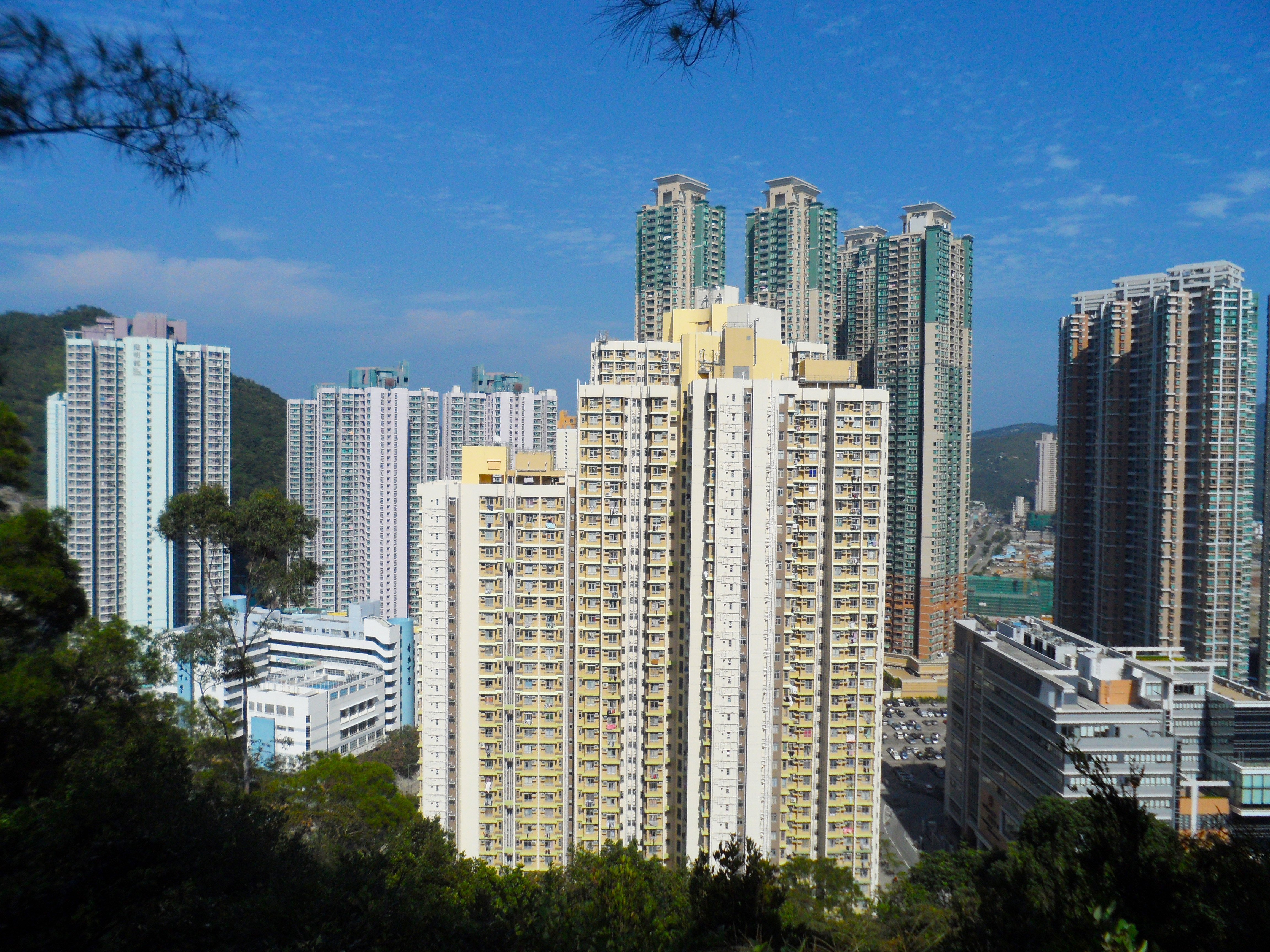 從澳景路看調景嶺健明邨及善明邨樓宇